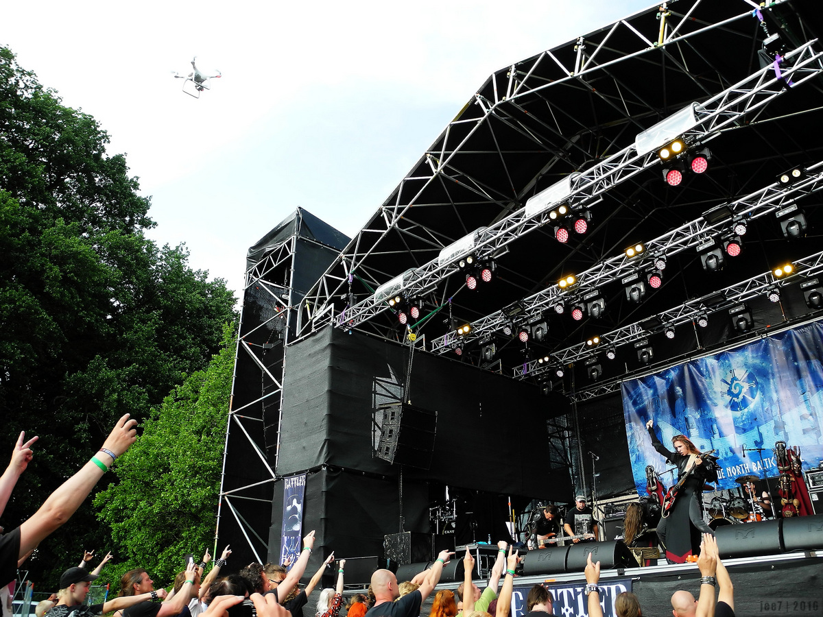 Rattler esineb muusikafestivalil Hard Rock Laager 2016. Õhus lendab droon.